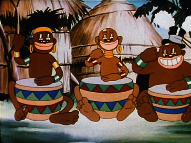 Una escena de la caricatura 'Jungle Jitters' (1938).